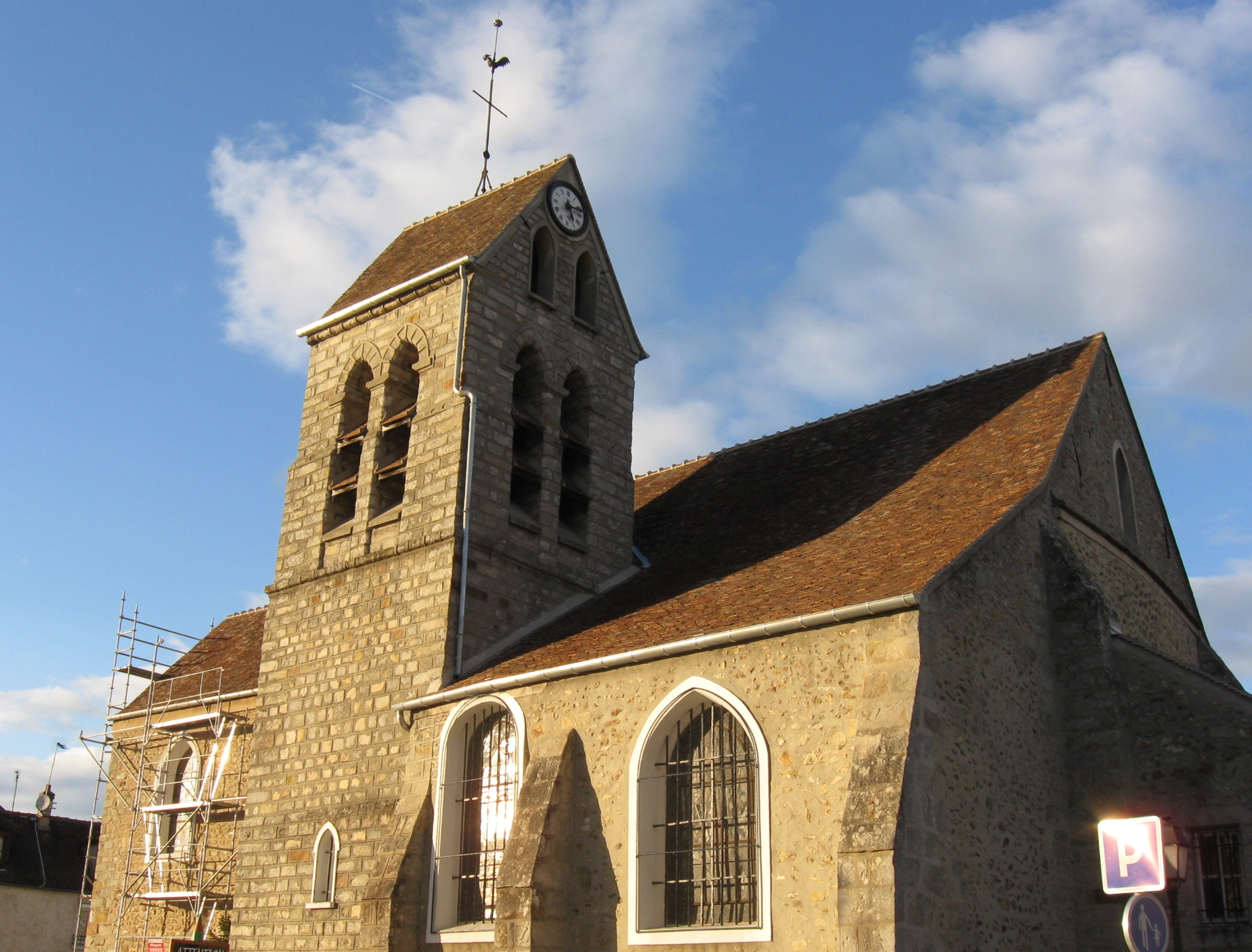 Église Saint-Germain-l'Auxerrois de Boissise-la-Bertrand. (Seine-et-Marne, région Île-de-France).